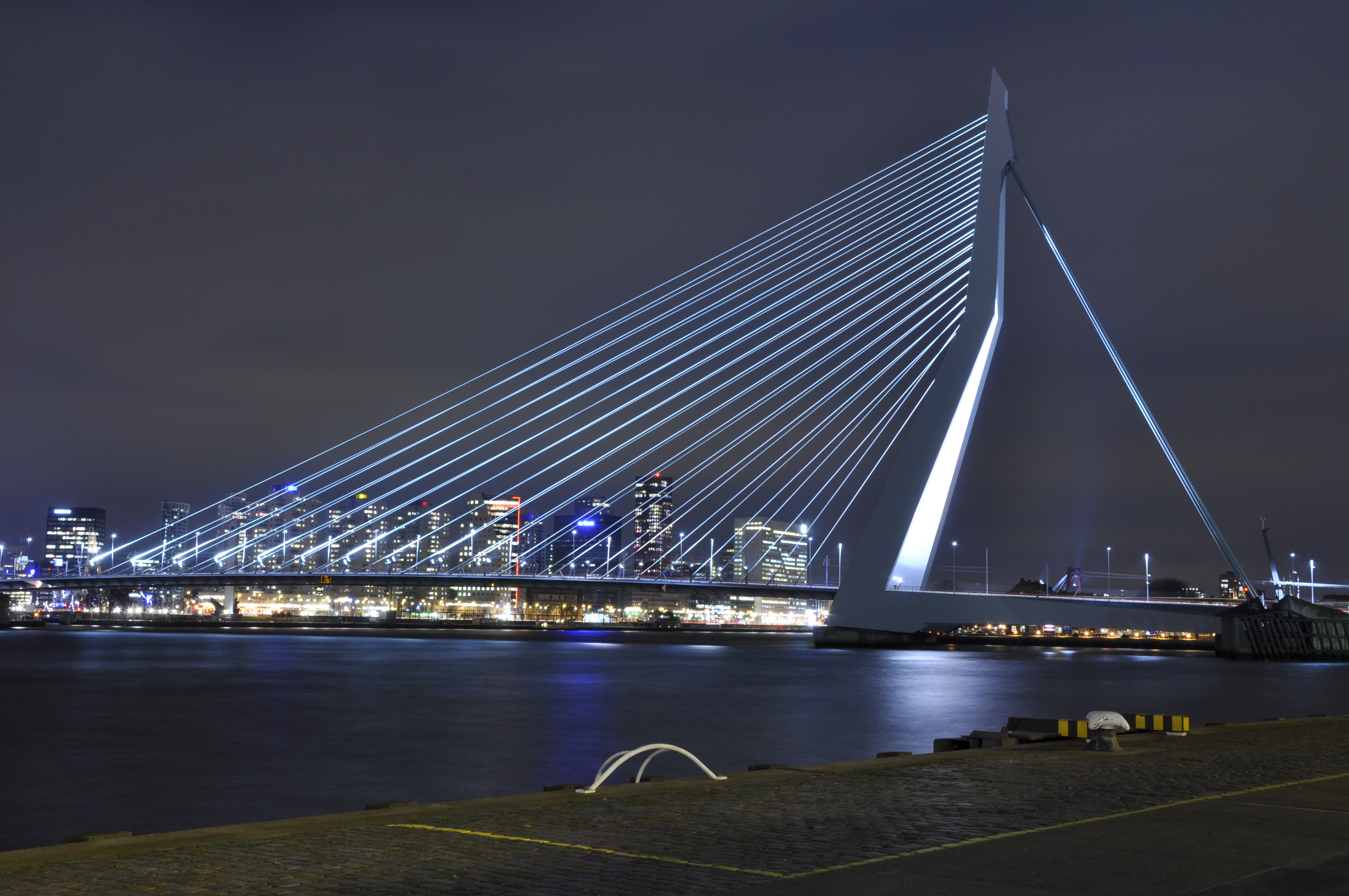 Erasmusbrug